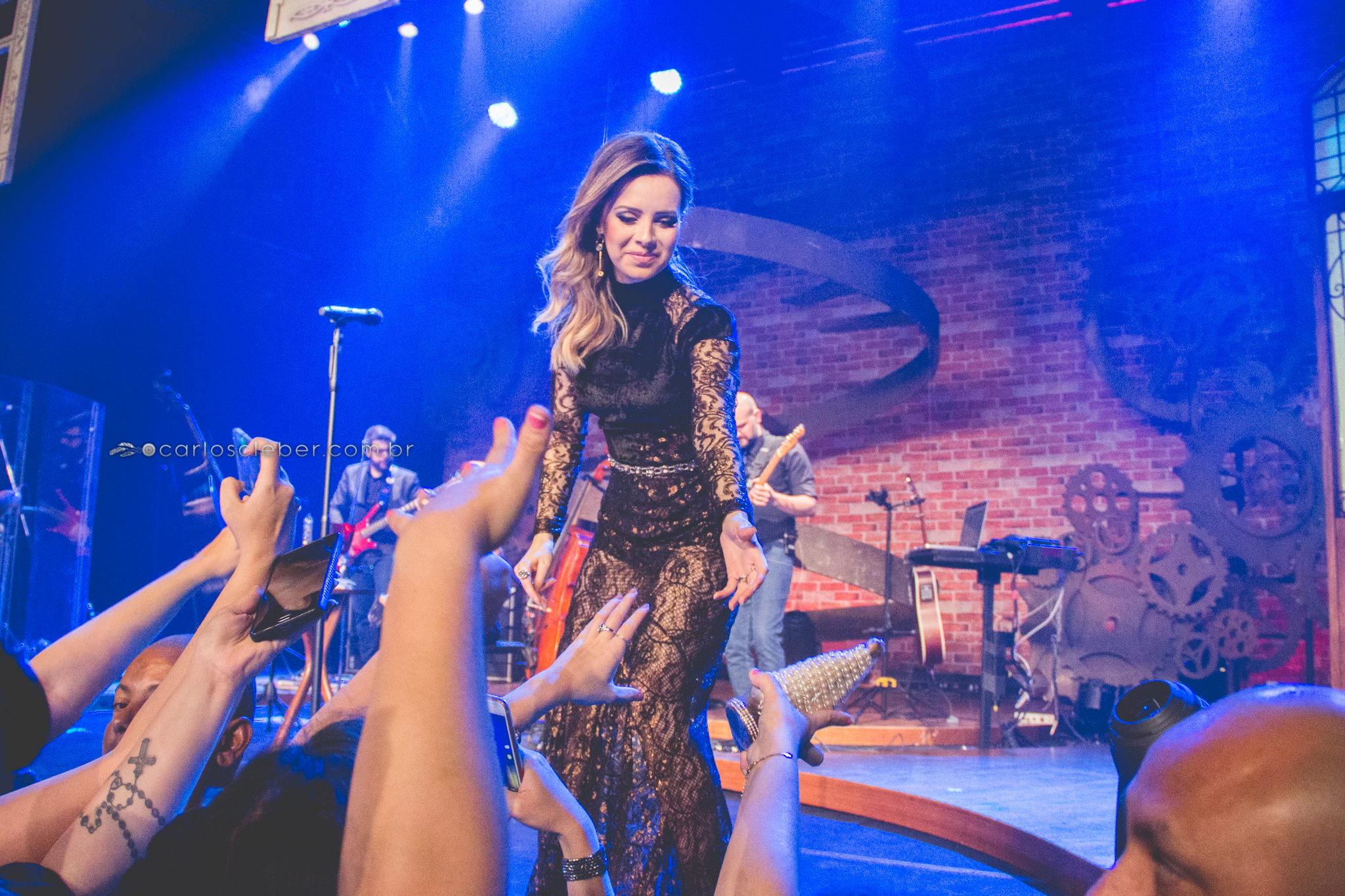 Meu Canto, setembro de 2017.